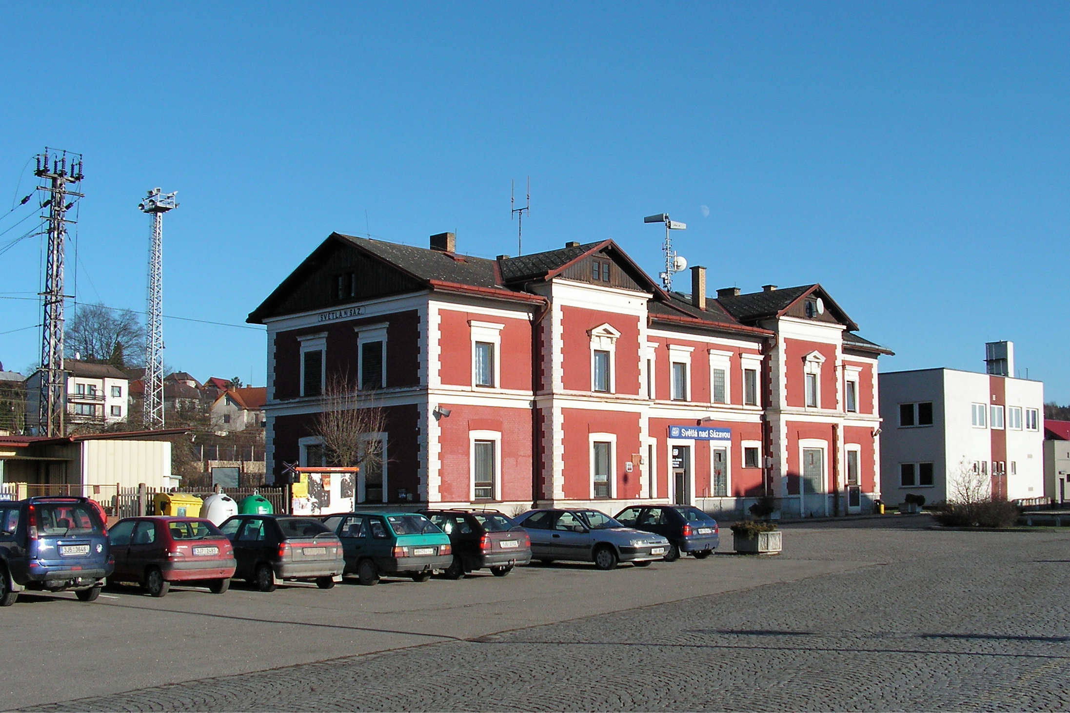 Nádražní budova ve Světlé nad Sázavou